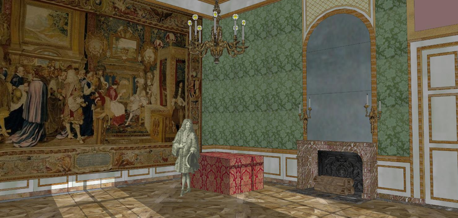 Essai de restitution de l'antichambre des jeux, vers 1700.